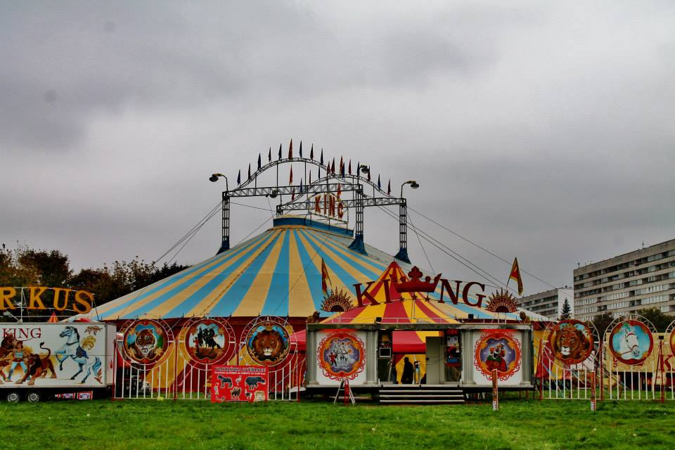 Cirkus King na Proseku